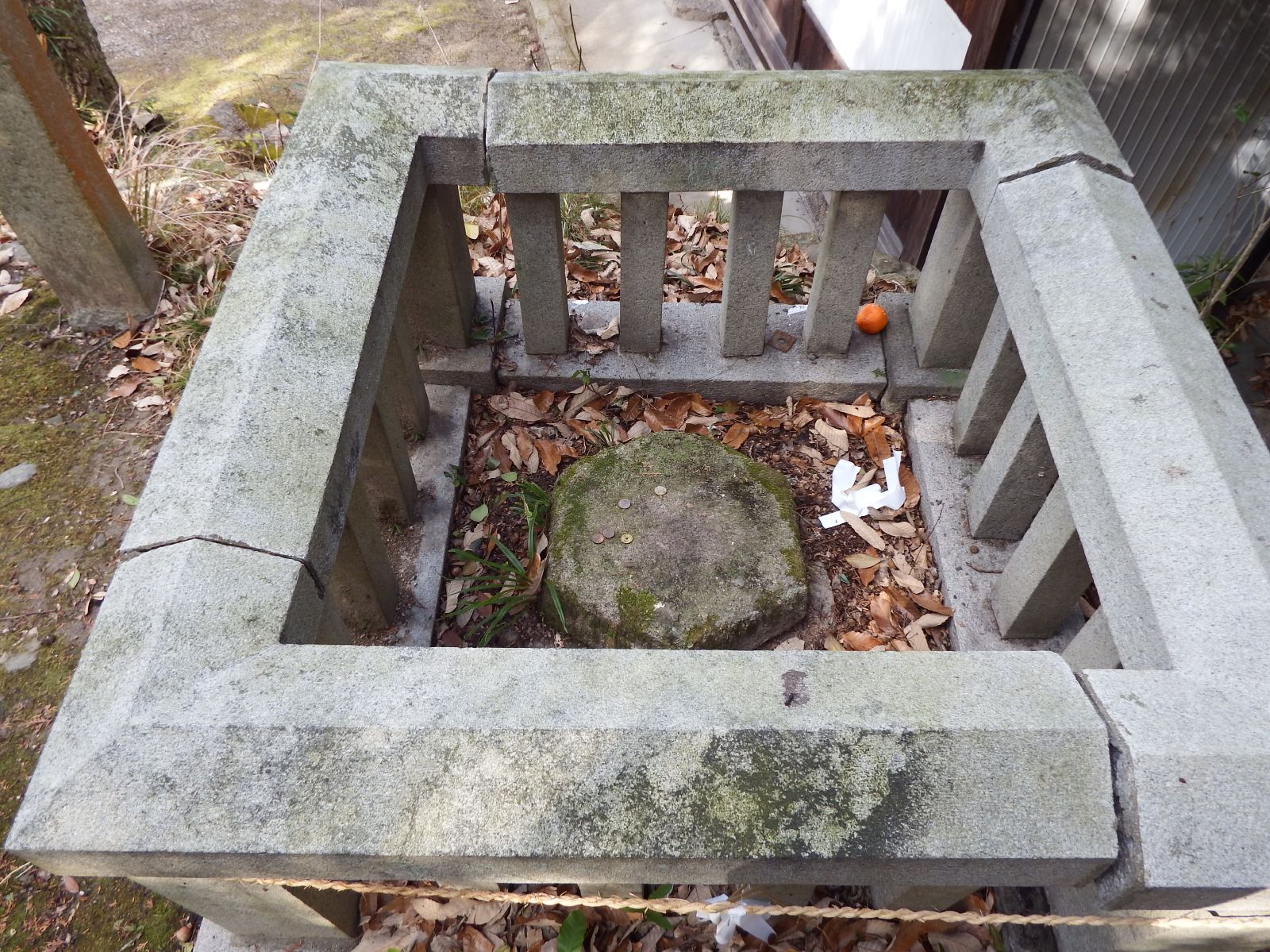 高家神社にある御棺基石